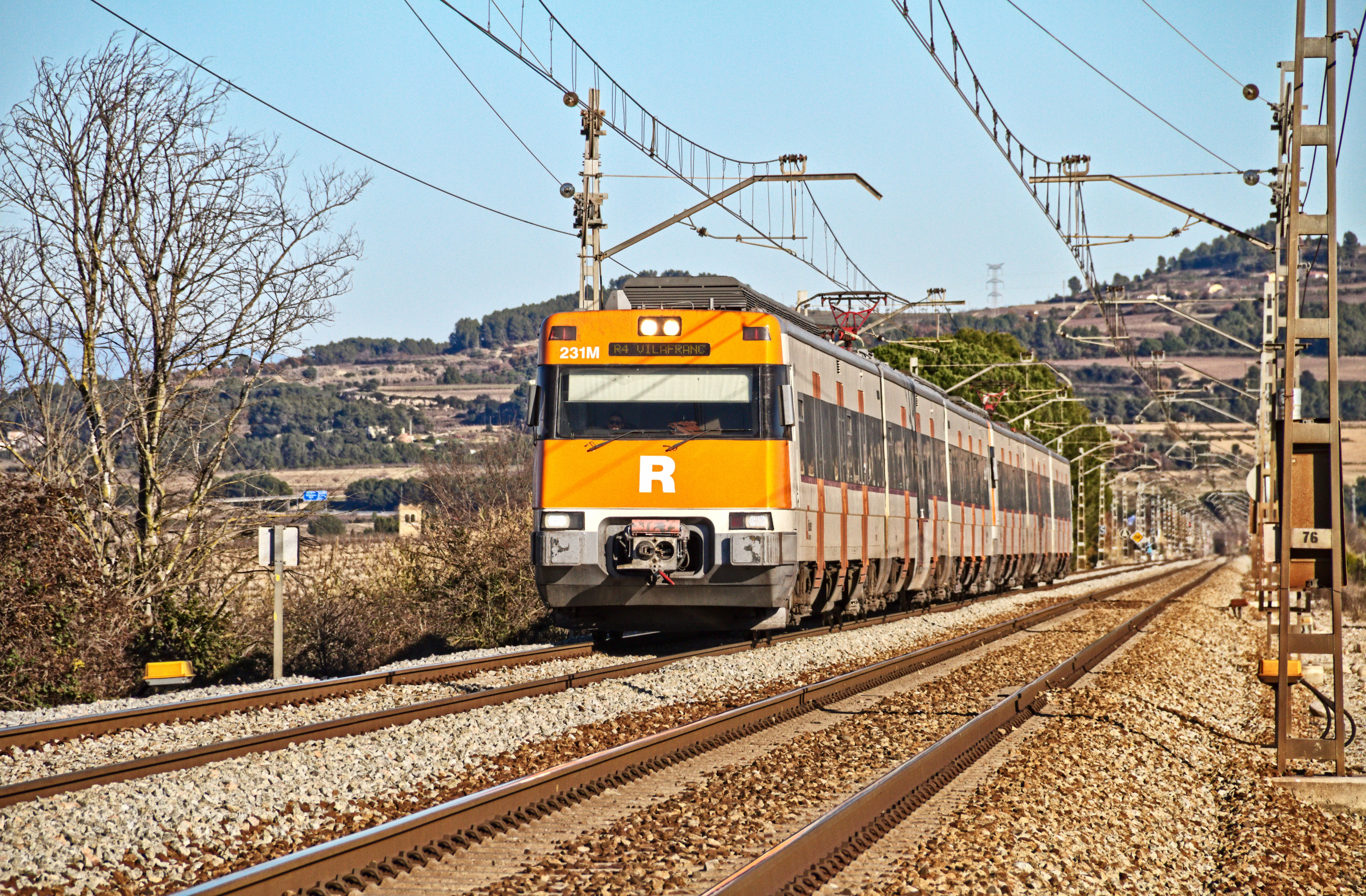 [CAT]: Parella de 447 reformades amb accés per a persones de mobilitat reduïda (PMR), al seu pas per Lavern. Son les primeres que enxampo, suposo que amb el temps serà normal veure'n. [ES]: Pareja de 447 reformadas con acceso para personas de movilidad reducida (PMR), a su paso por Lavern. Son las primeras que fotografío, supongo que con el tiempo será habitual verlas.